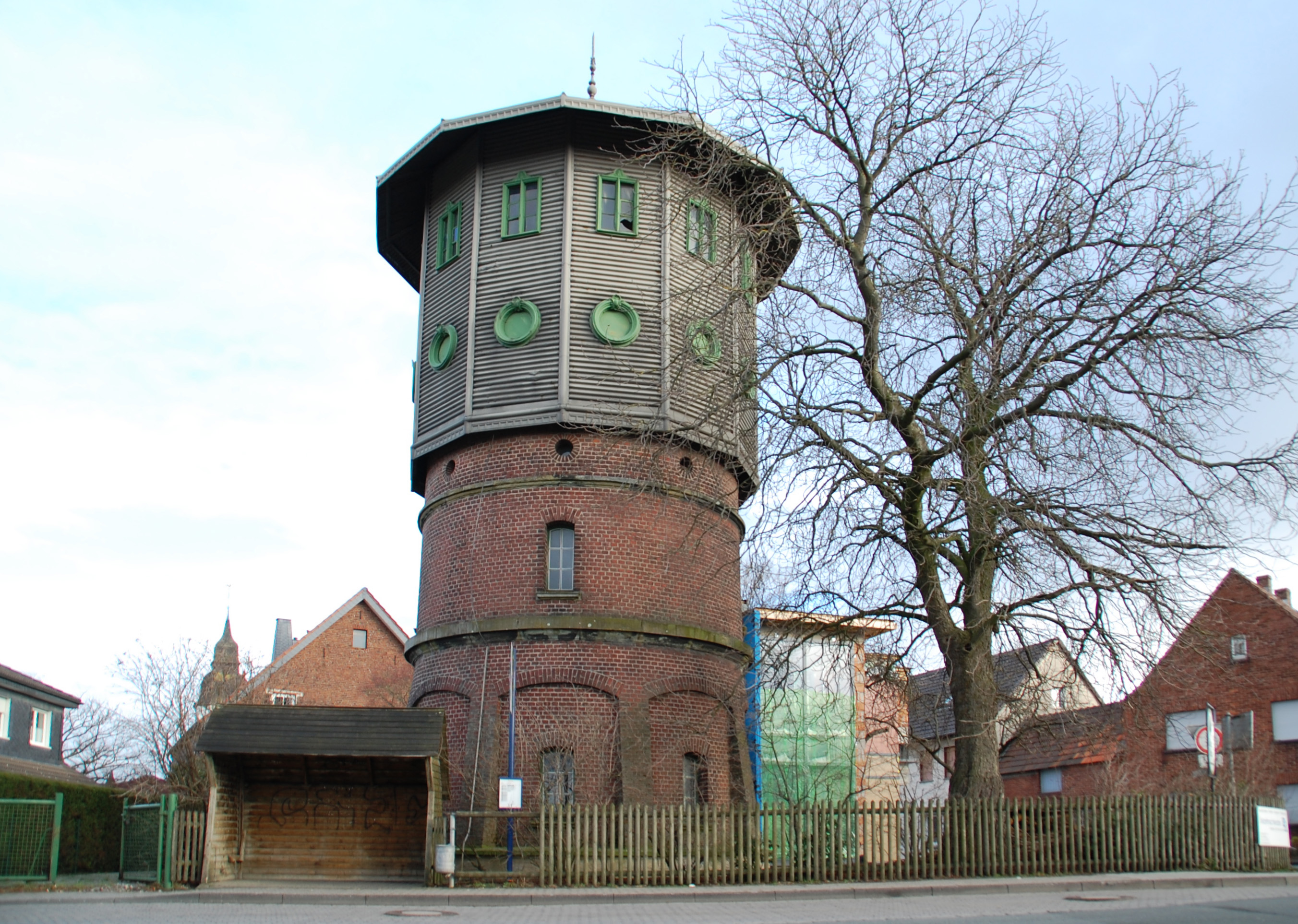 Wasserturm Eikeloh, Erwitte